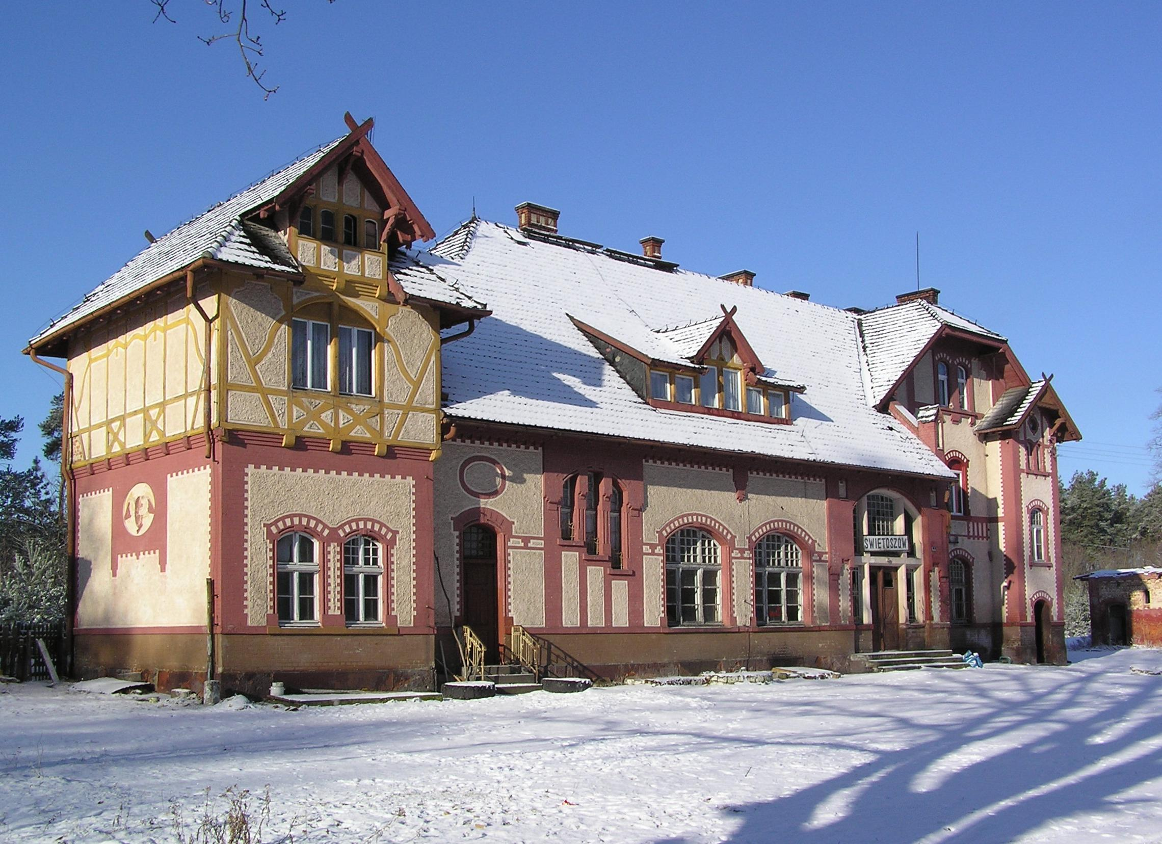 Nieczynny dworzec kolejowy w Świętoszowie.